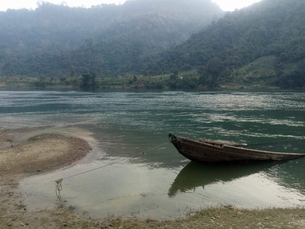 আসামের লুসাই পাহাড় হতে উৎপত্তি